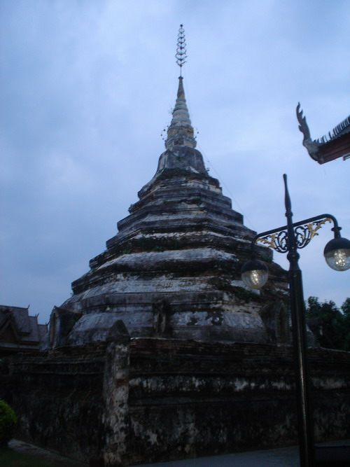 Wat_Luang2